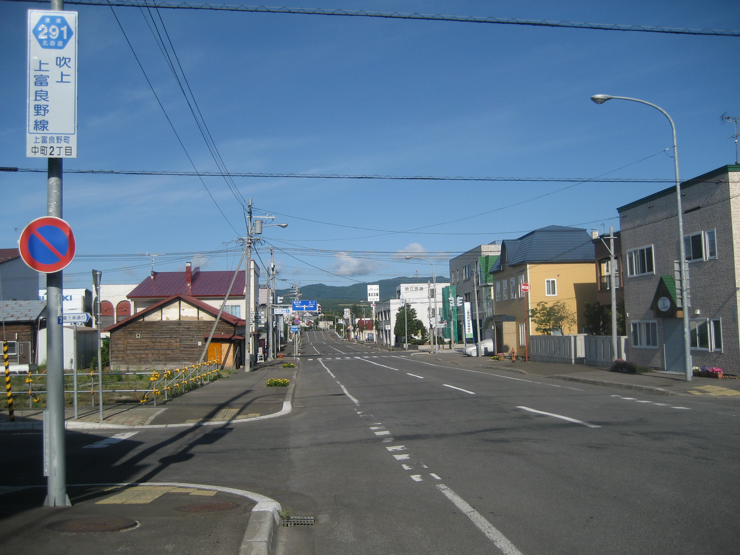 道道291号線上富良野町中町2丁目付近